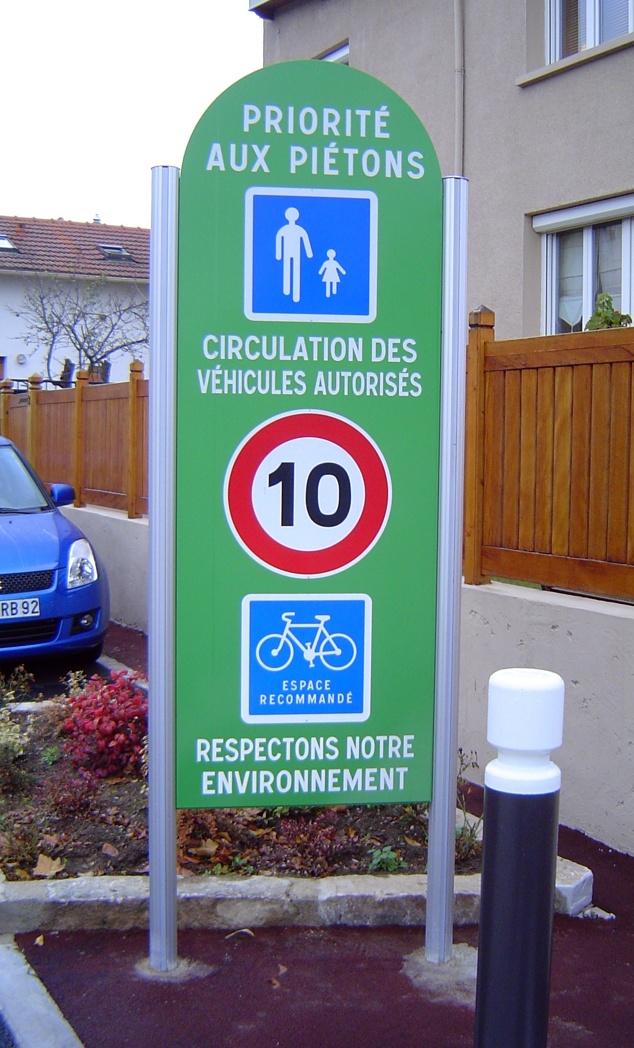 Photo d'un panneau zone10 à Antony